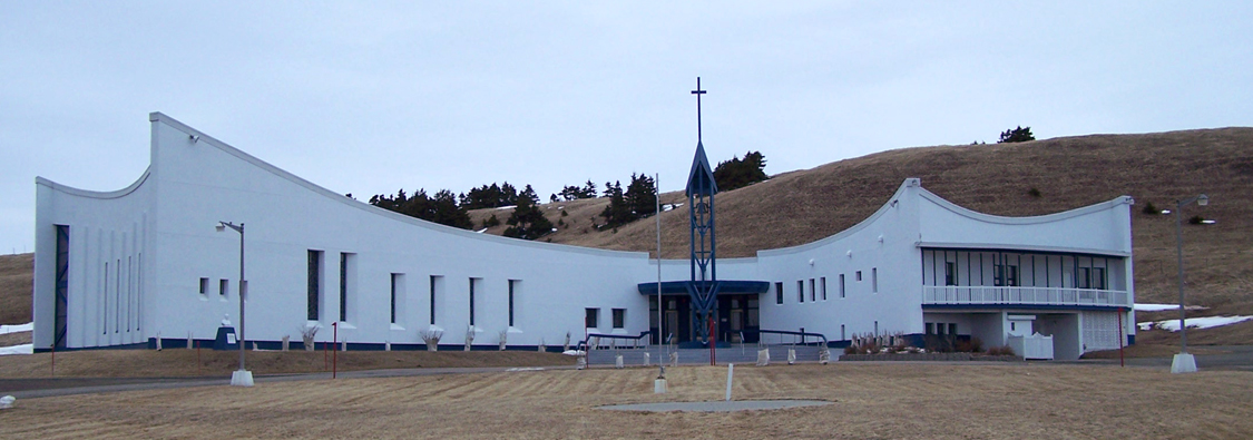 Église d'Havre-aux Maisons, aux Îles-de-la-Madeleine